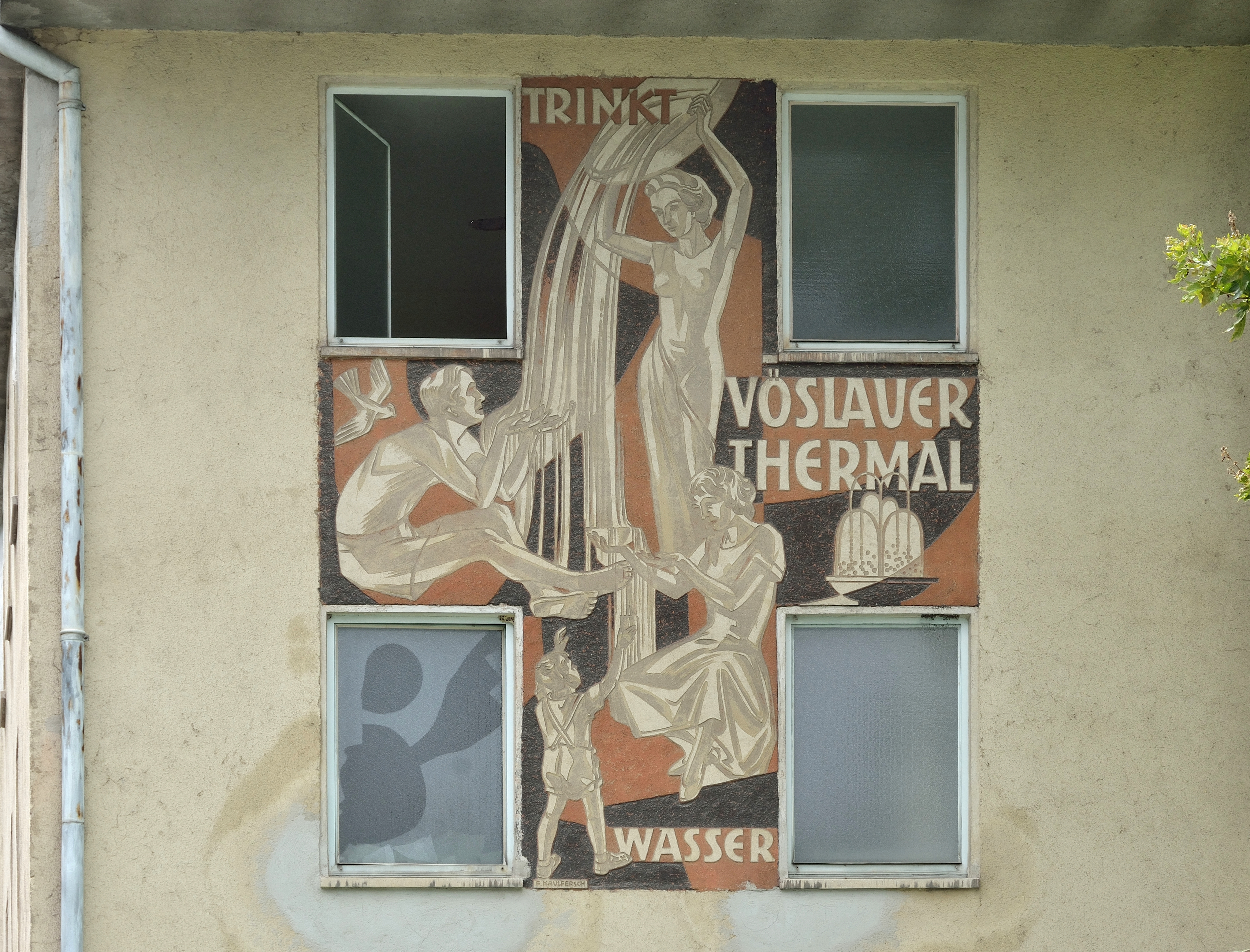 Trinkt Vöslauer Thermalwasser, Sgraffito von Franz Kaulfersch am Südflügel des Thermalbads im Maital, Bad Vöslau.